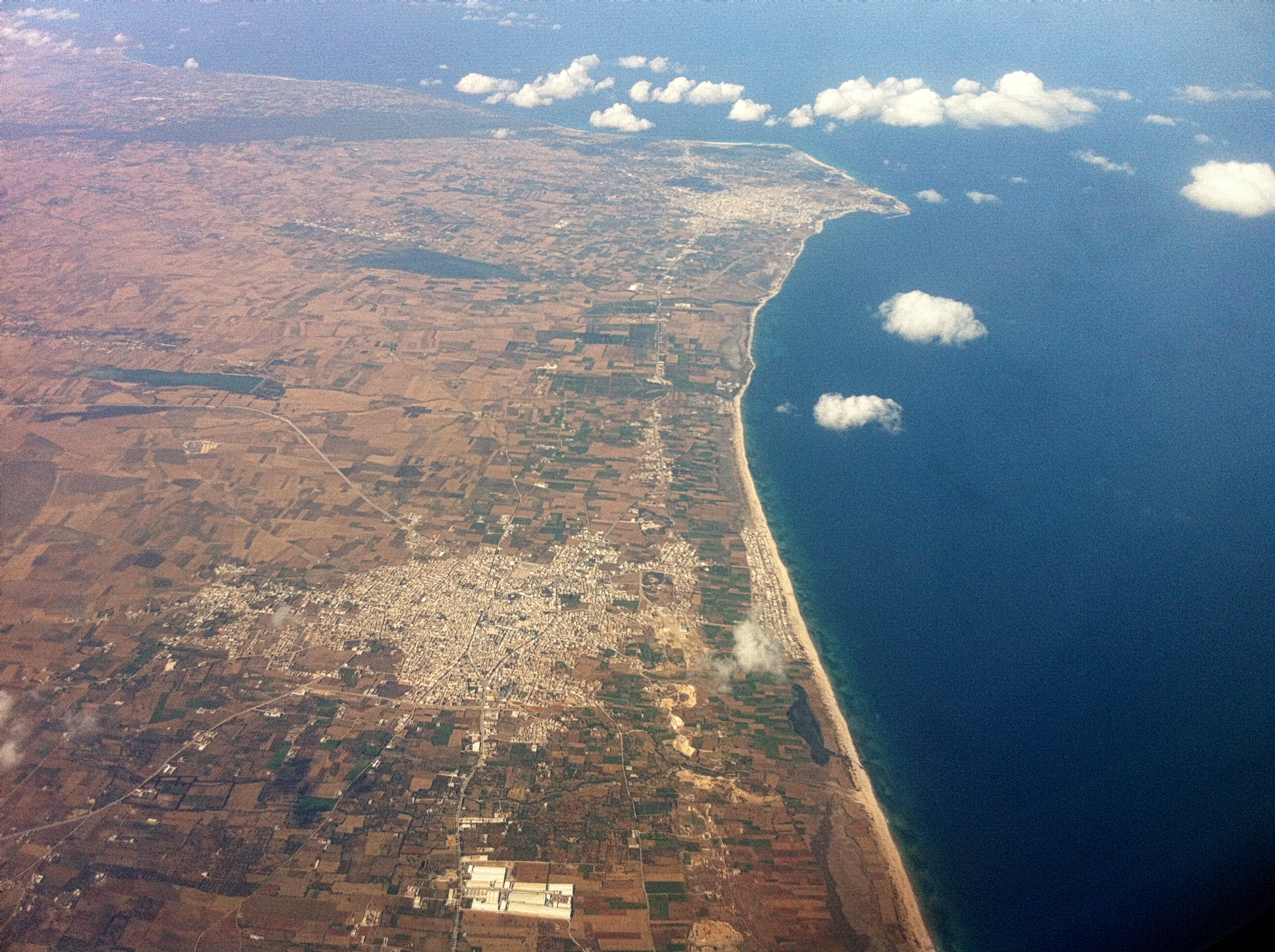 Vue aérienne des villes de Menzel Temine et Kélibia du Cap Bon (Tunisie)